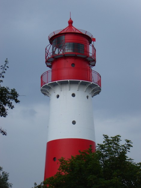 Leuchtturm in Falshöft (Gemeinde Pommerby im Kreis Schleswig-Flensburg)